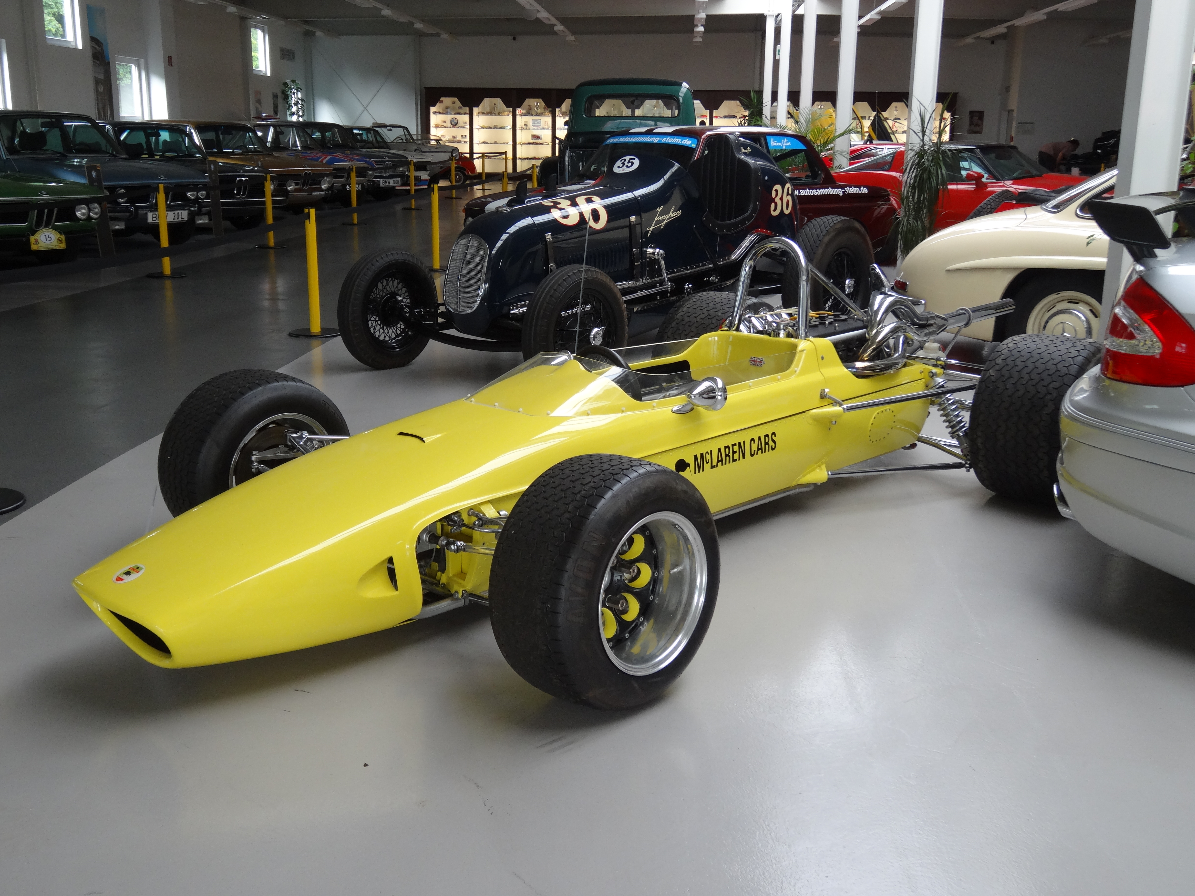 Autosammlung Steim - Schramberg 097 McLaren